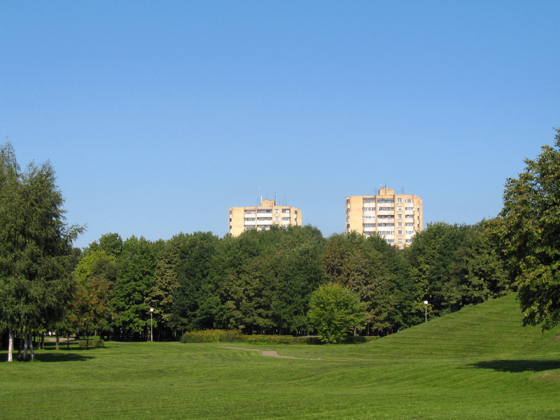 Draugystės parkas Dainavoje, Kaunas.